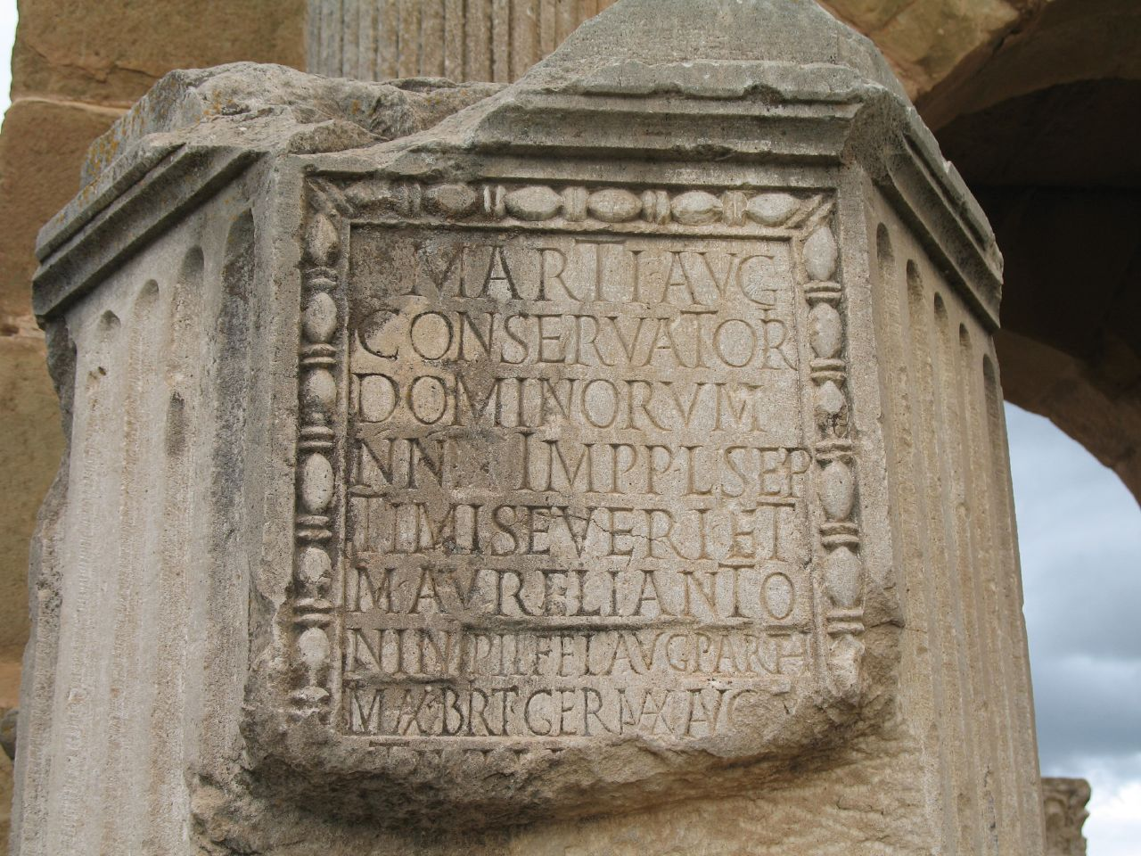 Ruines romaines de Timgad (Wilaya de Batna, Algérie).